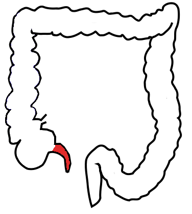 AppendiceVermiforme (parte dell'intestino crasso)